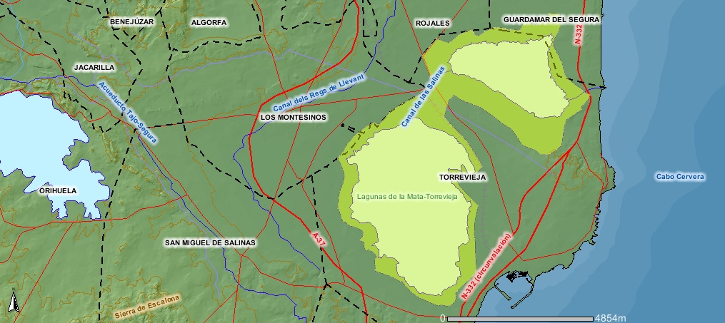 Mapa del parque natural de Lagunas de Mata-Torrevieja